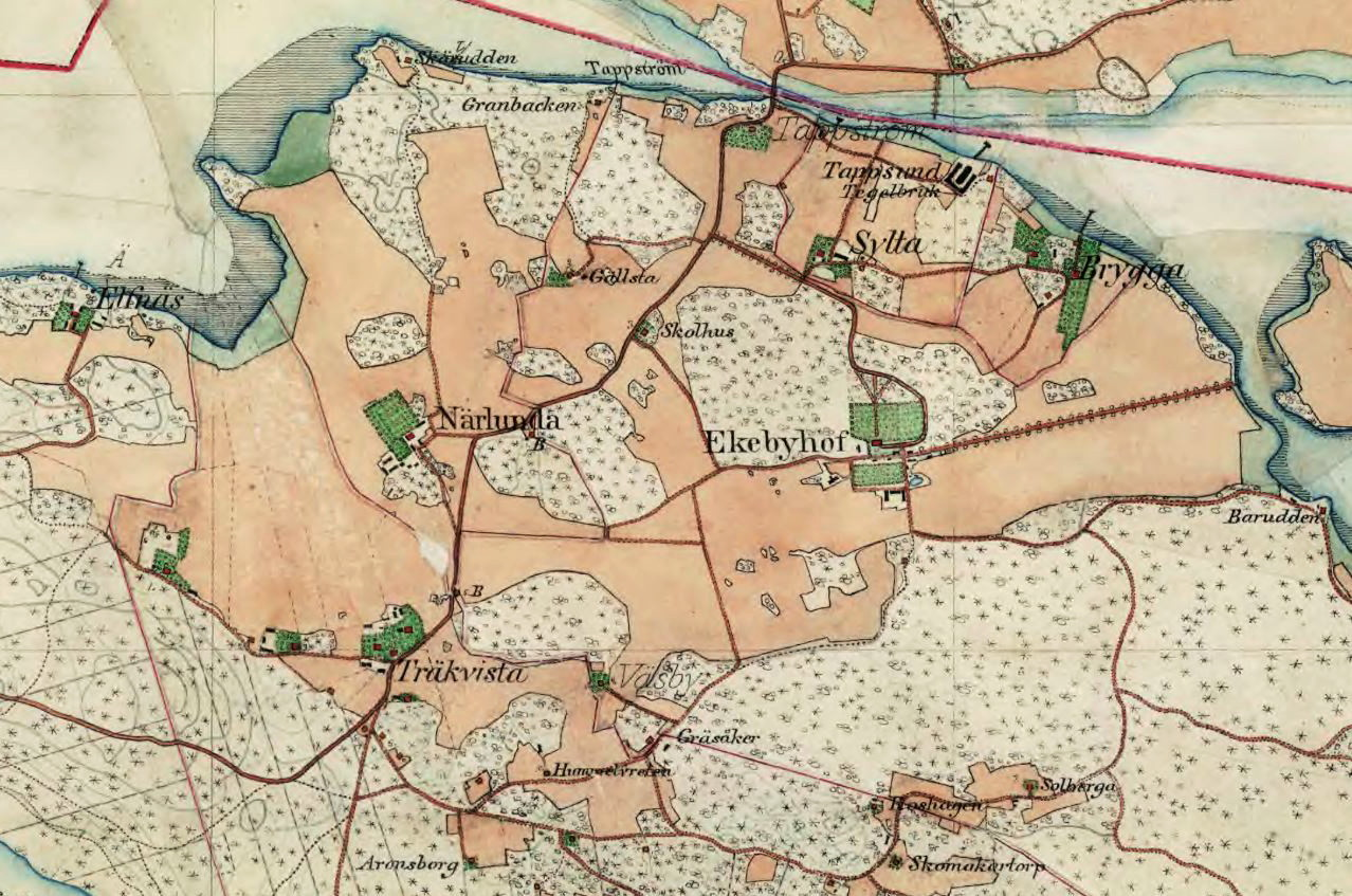 Karta över Träkvista, Närlunda, Ekebyhov, Älvnäs mm.